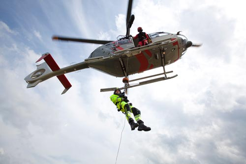 Kletter-Einheit mit Manuel Marburger seilt sich vom Hubschrauber bei der Kletterschule ab